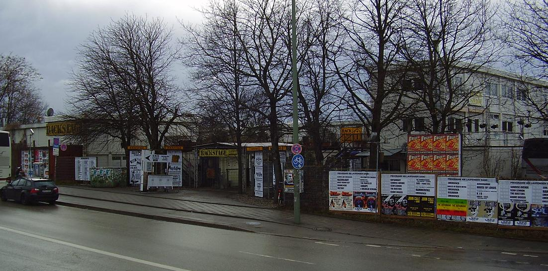 Das New Backstage (Musik-Club / Discothek / Musikkonzerthalle) an der Friedenheimer Brücke in München (Munich / Germany)